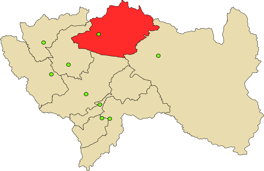 Mapa de Provincia de Chanchamayo en Perú